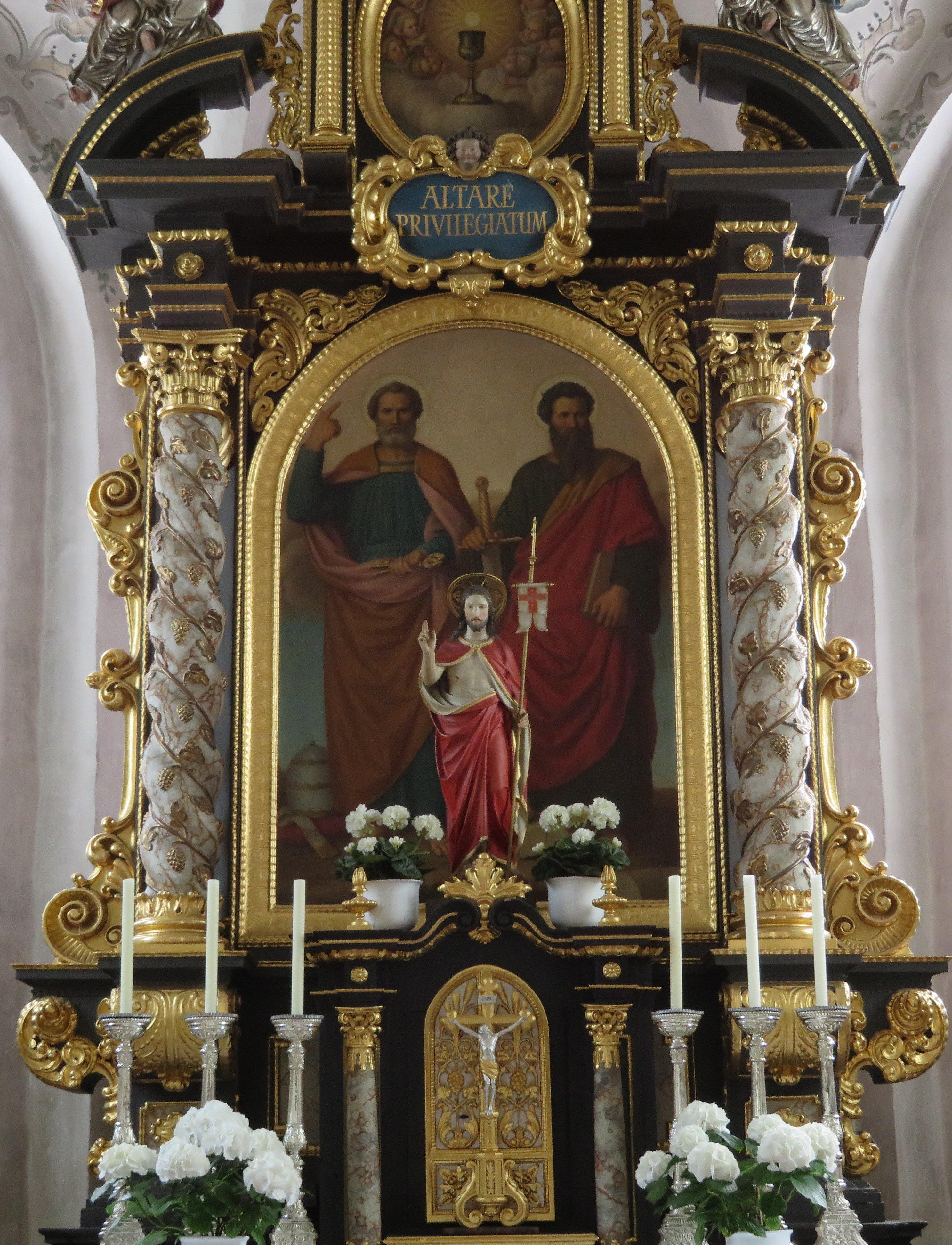 Altar in St. Peter und Paul